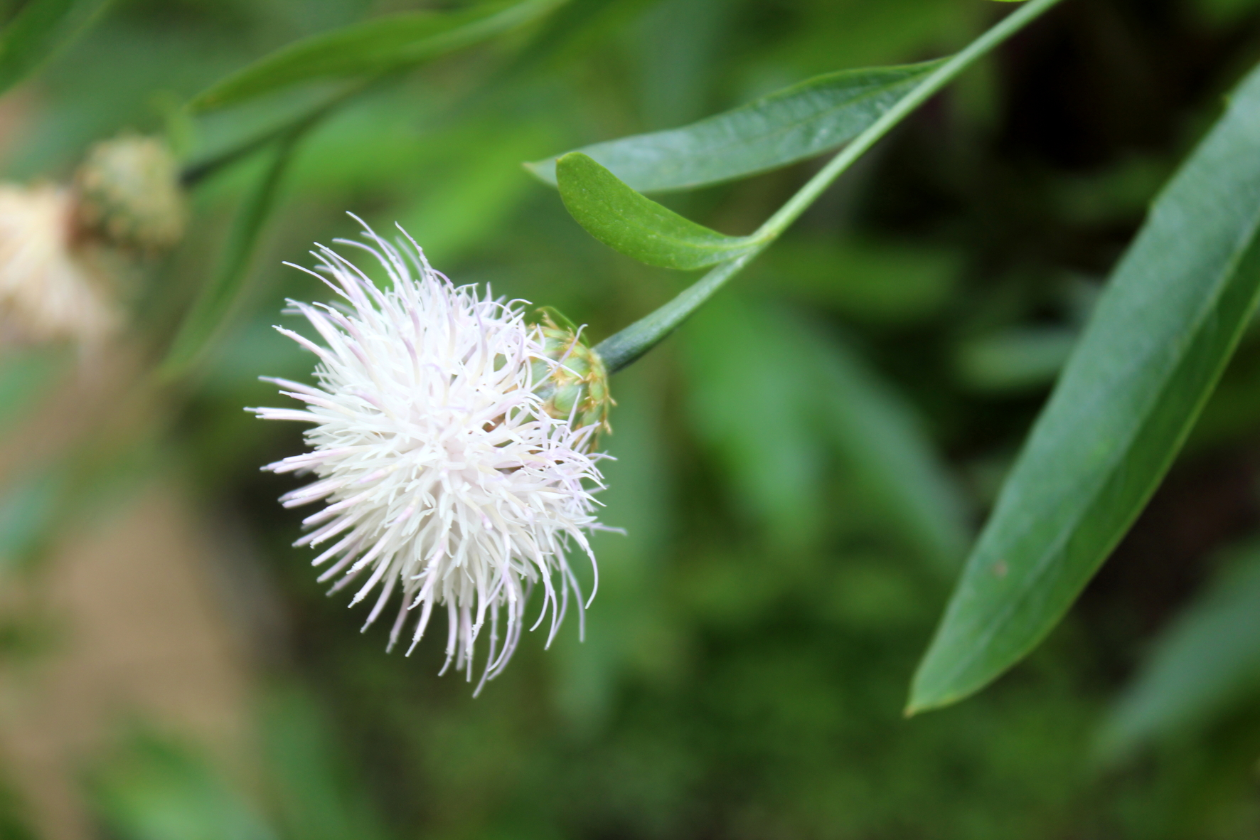 Cheirolophus tagananensis, photo prise au Conservatoire national de botanique de Brest à l'occasion du "Wiki takes Conservatoire Botanique National de Brest"